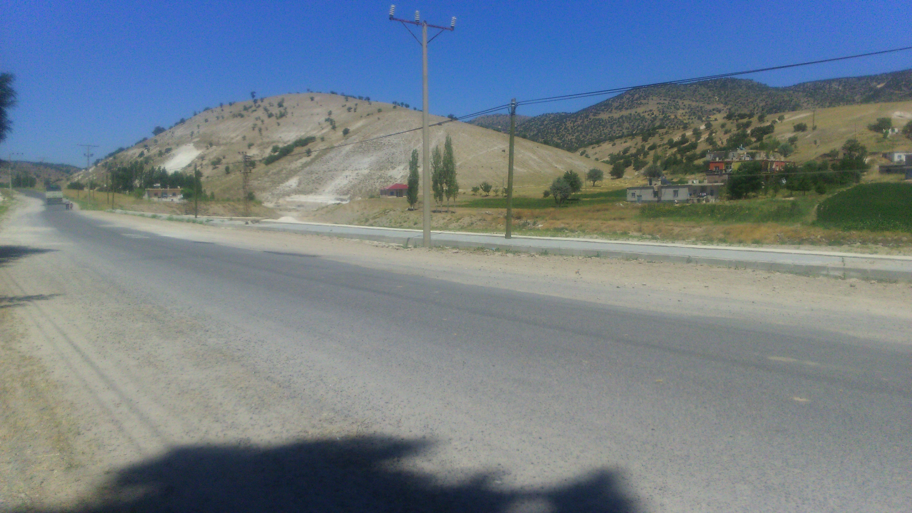 Hayrat'tan Bakıldığında Yalın Burnu